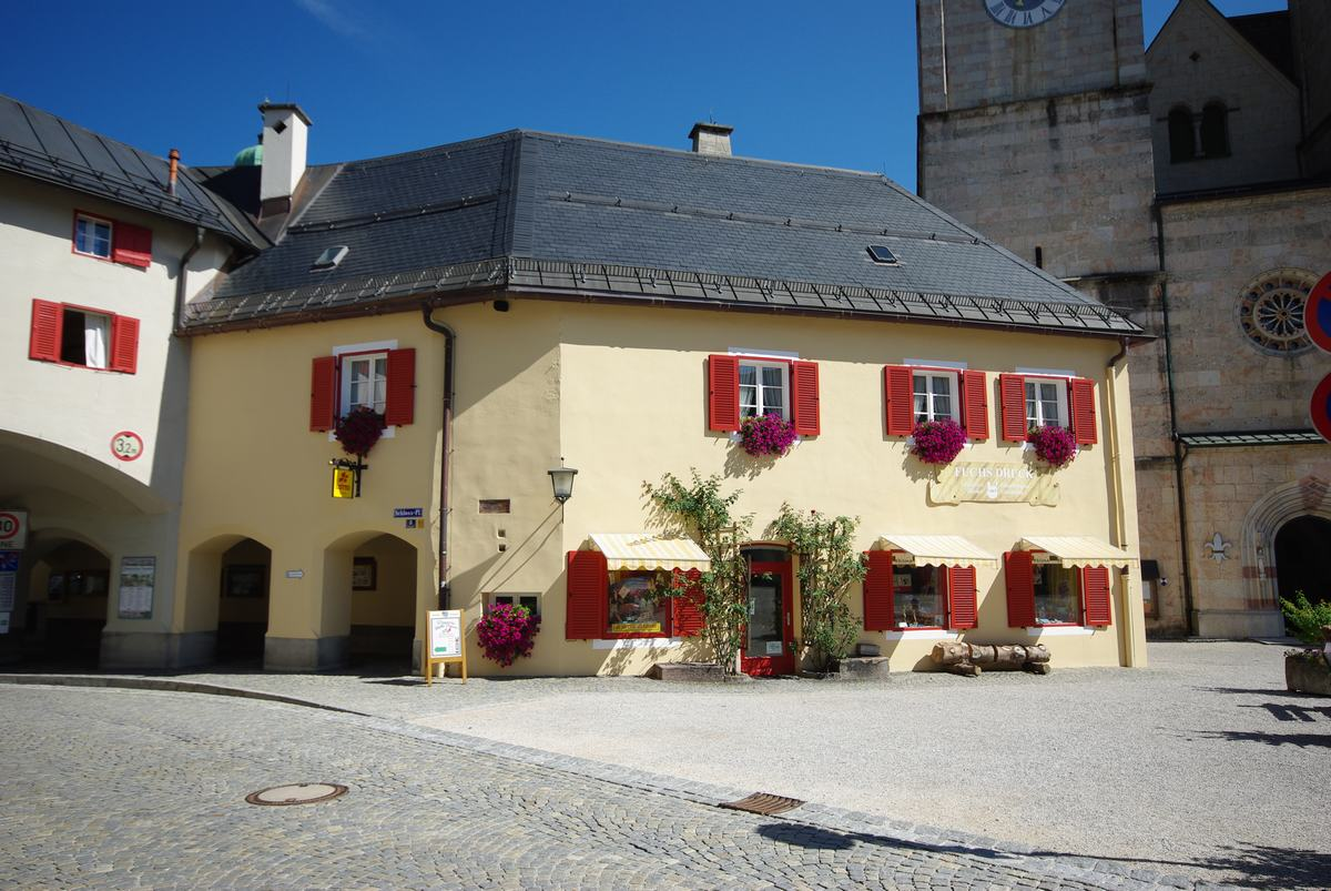 Schloßplatz 8, 83471 BerchtesgadenThis is a photograph of an architectural monument.